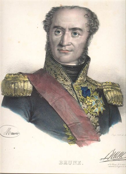 Der Marschall von Frankreich Guillaume Marie Anne Brune (1763-1815)